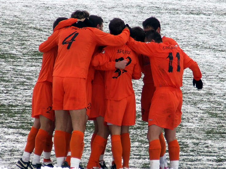 Jucatorii Unirii Urziceni bucurandu-se dupa un gol inscris in poarta Universitatii Cluj la 15 decembrie 2007.